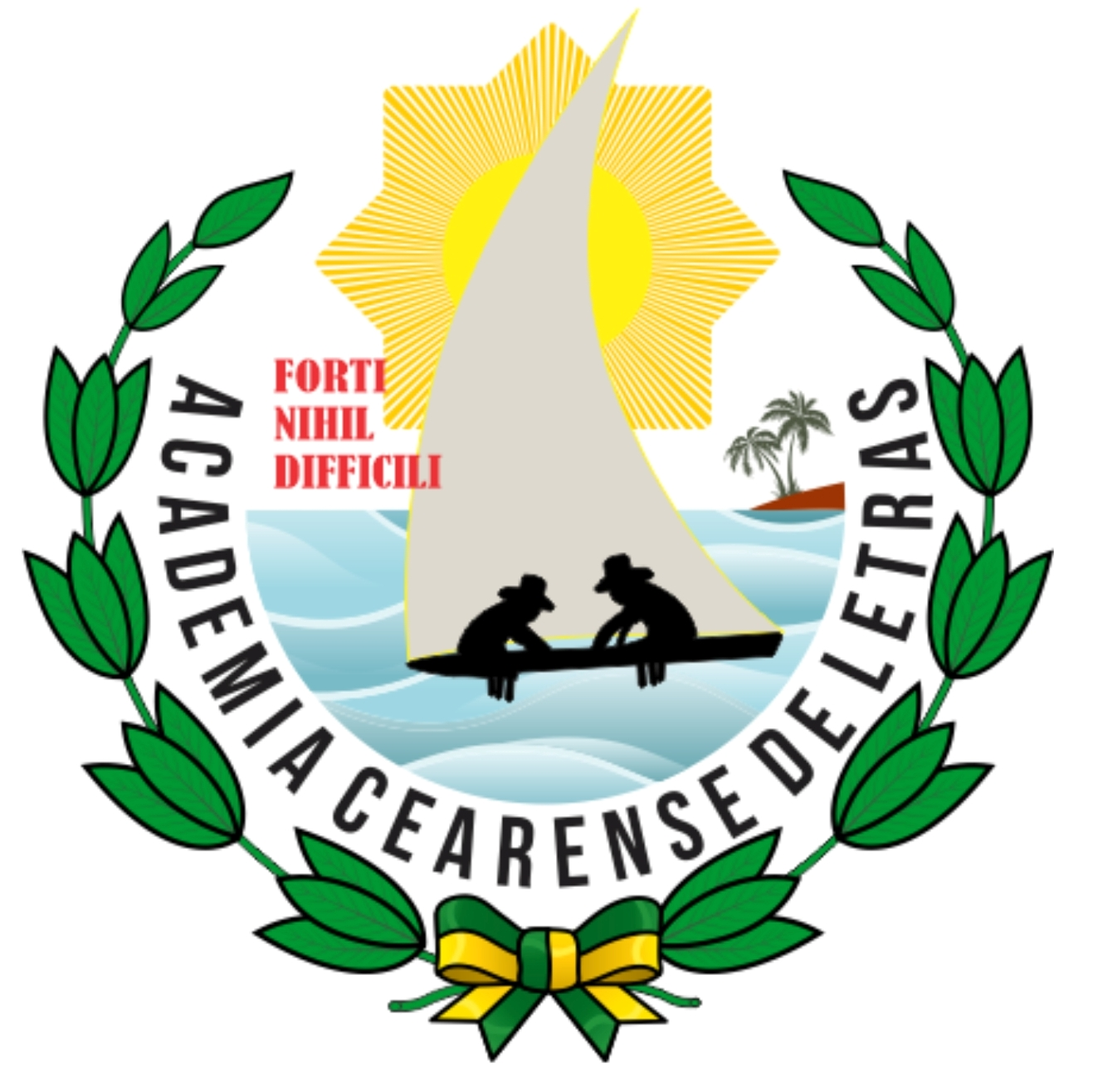 Emblema original que foi criado na fundação da Academia Cearense de Letras. O emblema consiste principalmente numa jangada ao mar com seus jangadeiros em trabalho; ao fundo, existe um resplendor em simbologia de sol nascente. Contornando um emblema tem dois ramos florido e frutificado em própria cor de café e fumo que havia no brasão do estado do Ceará. É um emblema bem representativo da heráldica do estado brasileiro do Ceará.